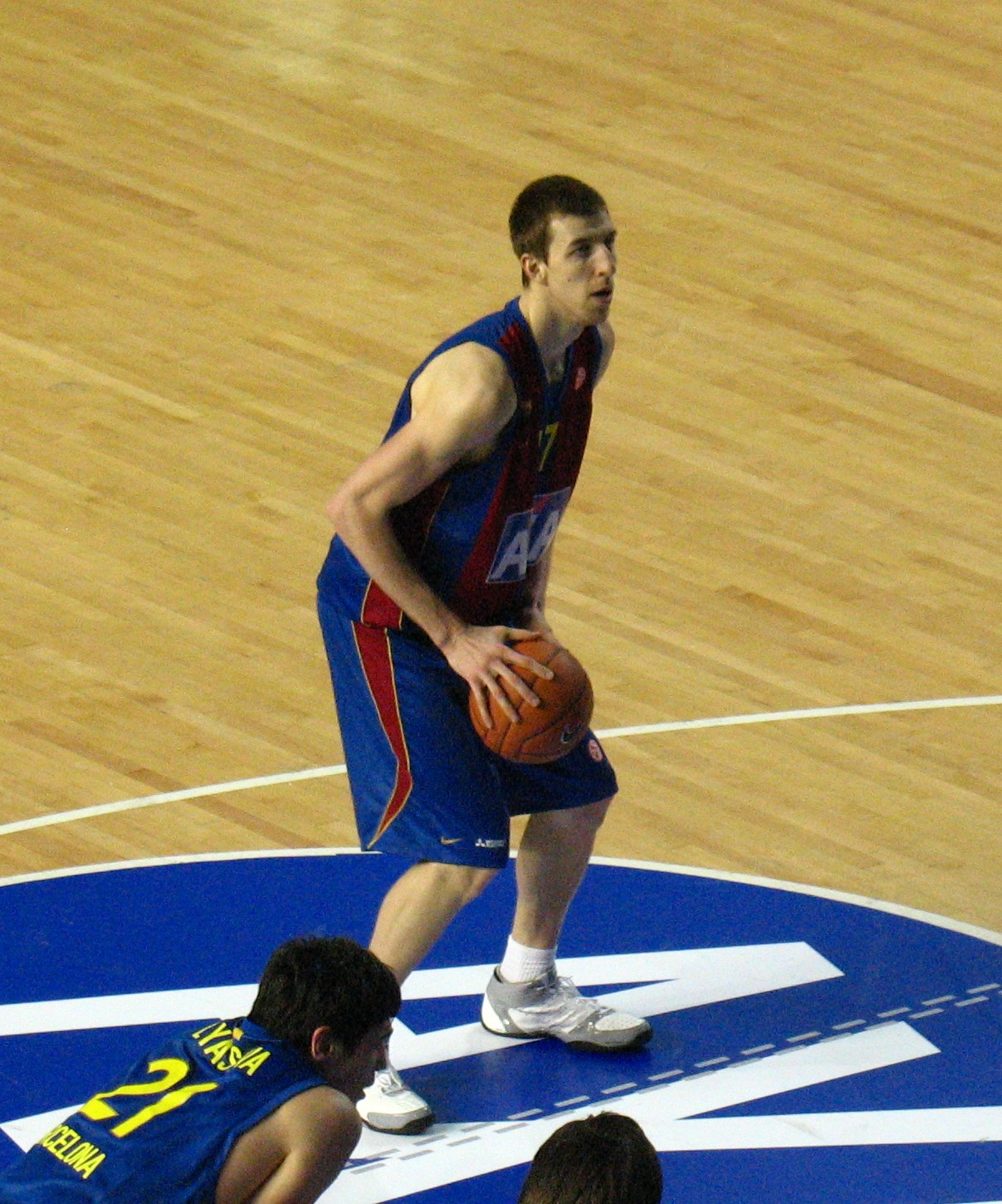 Fran Vazquez en un pártido con el Barcelona en Febrero de 2008